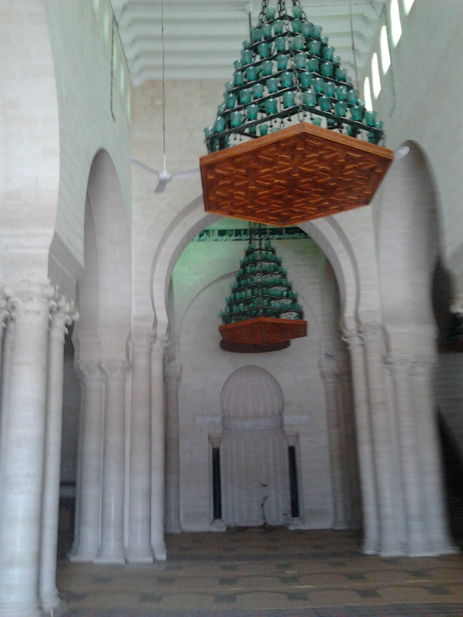 Le grand mosquée de Mahdia (mosquée Fatimide)